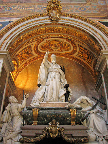 tumulo de leão 13